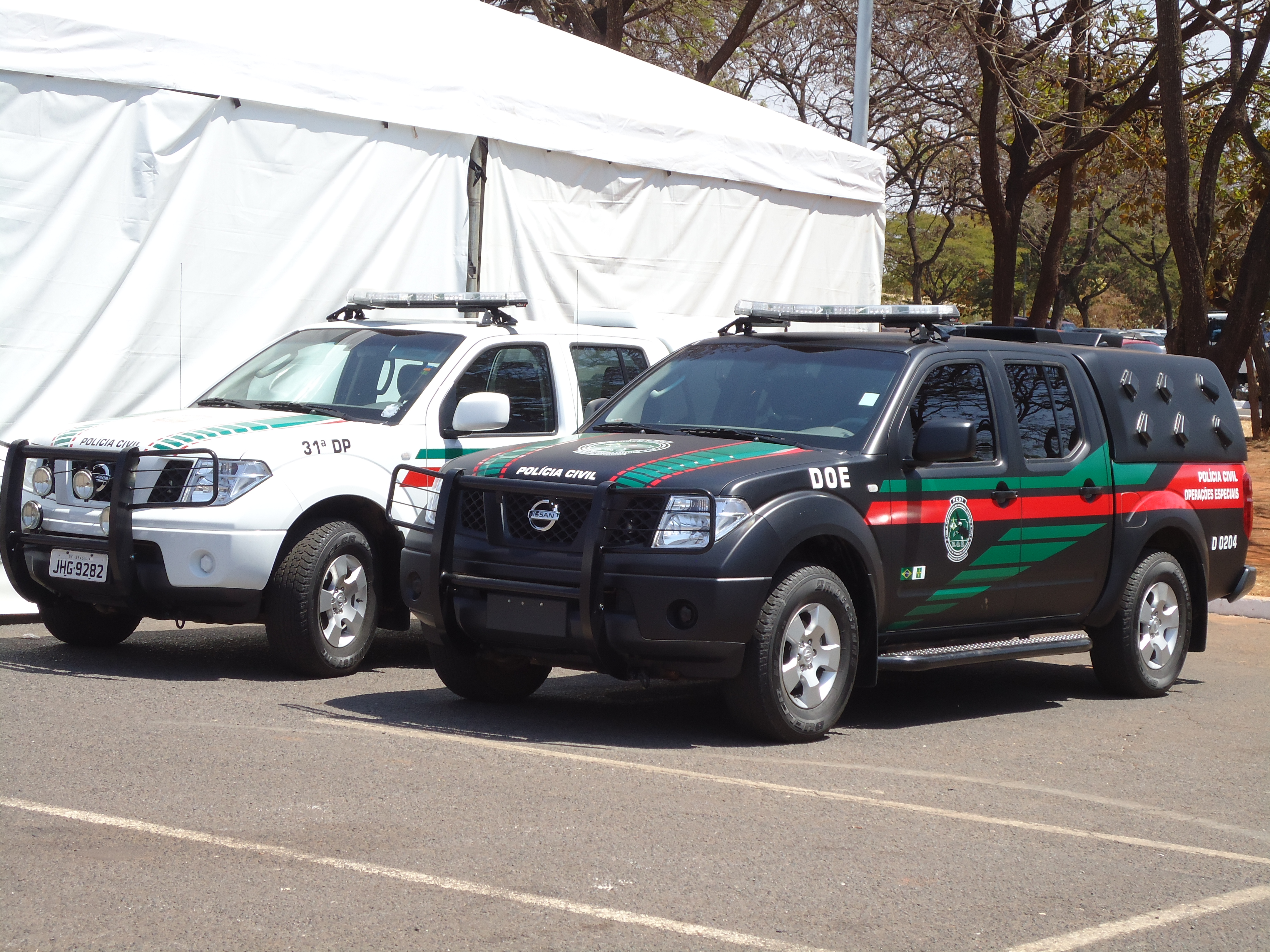 viaturas da 31º DP e DOE na exposição da independência PCDF